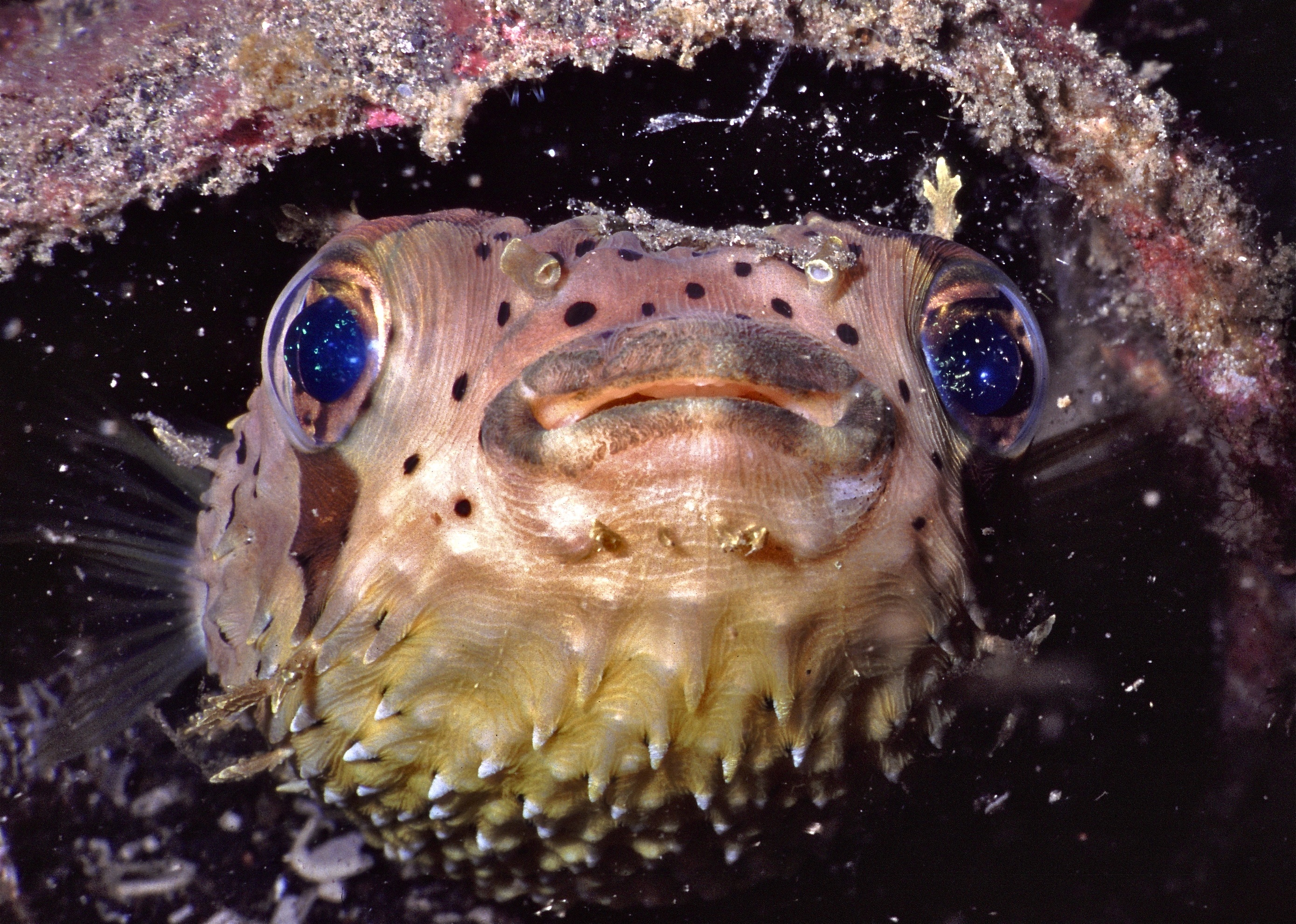 Lembeh Strait, Sulawesi, INDONESIA